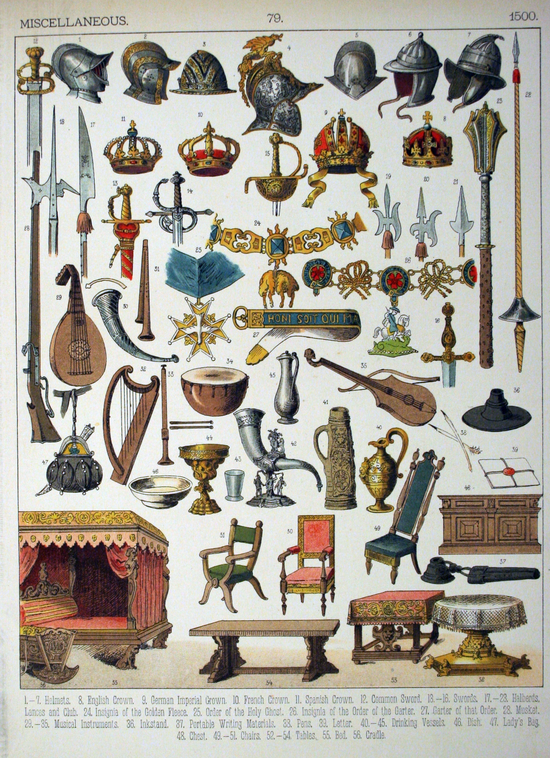 1500, Misc